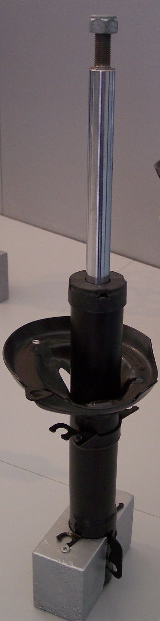 Stoßdämpfer